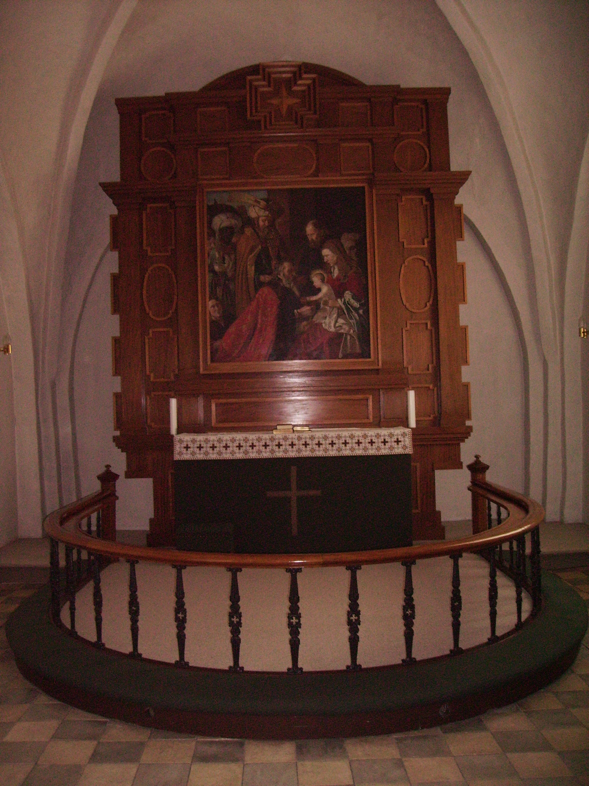 Nørre Nærå Kirke, Nørre Nærå Sogn, Skam Herred, Odense Amt, Denmark (Danish Church) - Nørre Nærå Kirkes alter